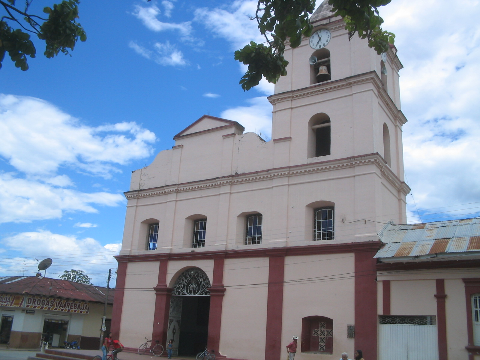 Iglesia de Natagaima, Tolima. Diego Urbina 2006